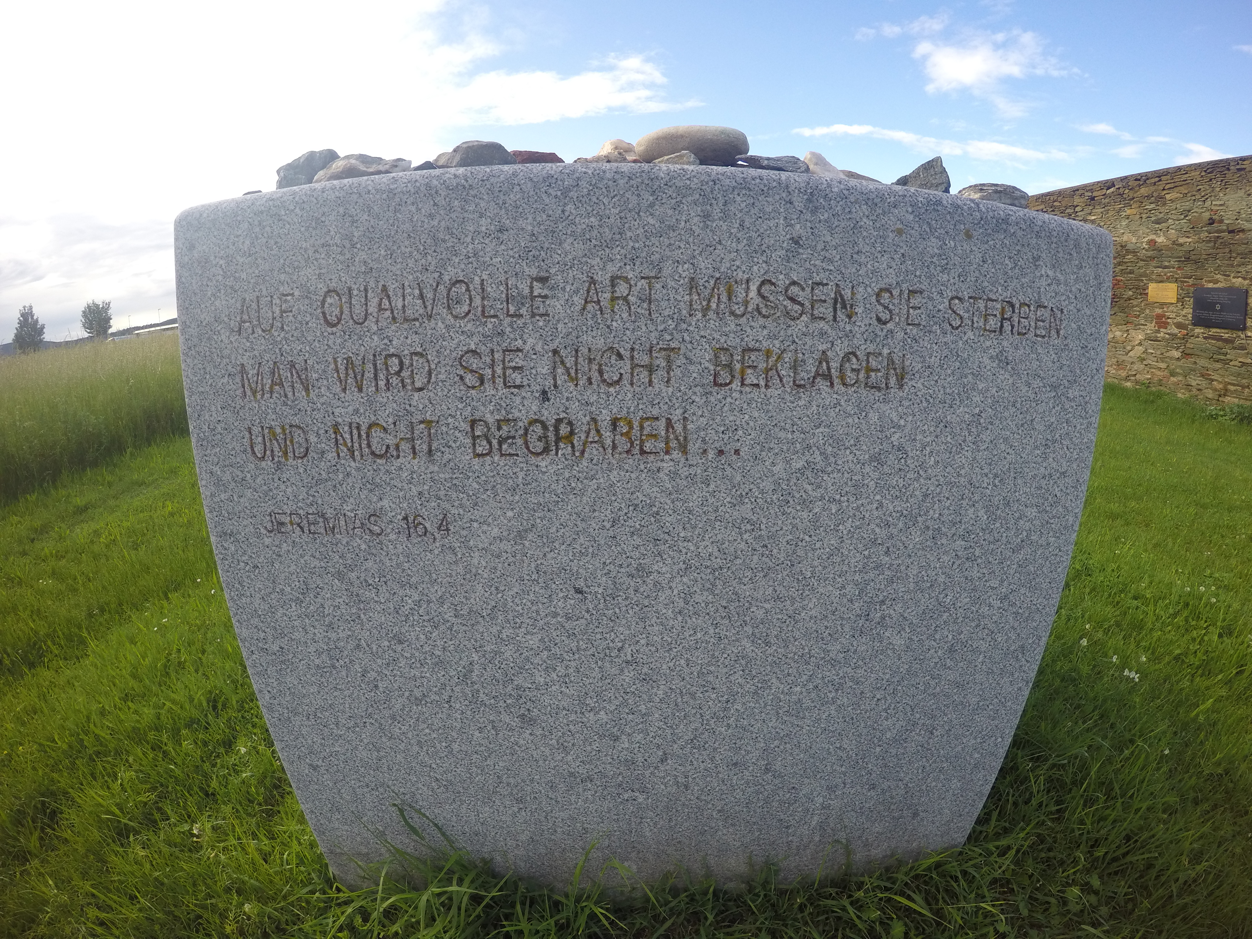 In Stein eingravierter Satz.